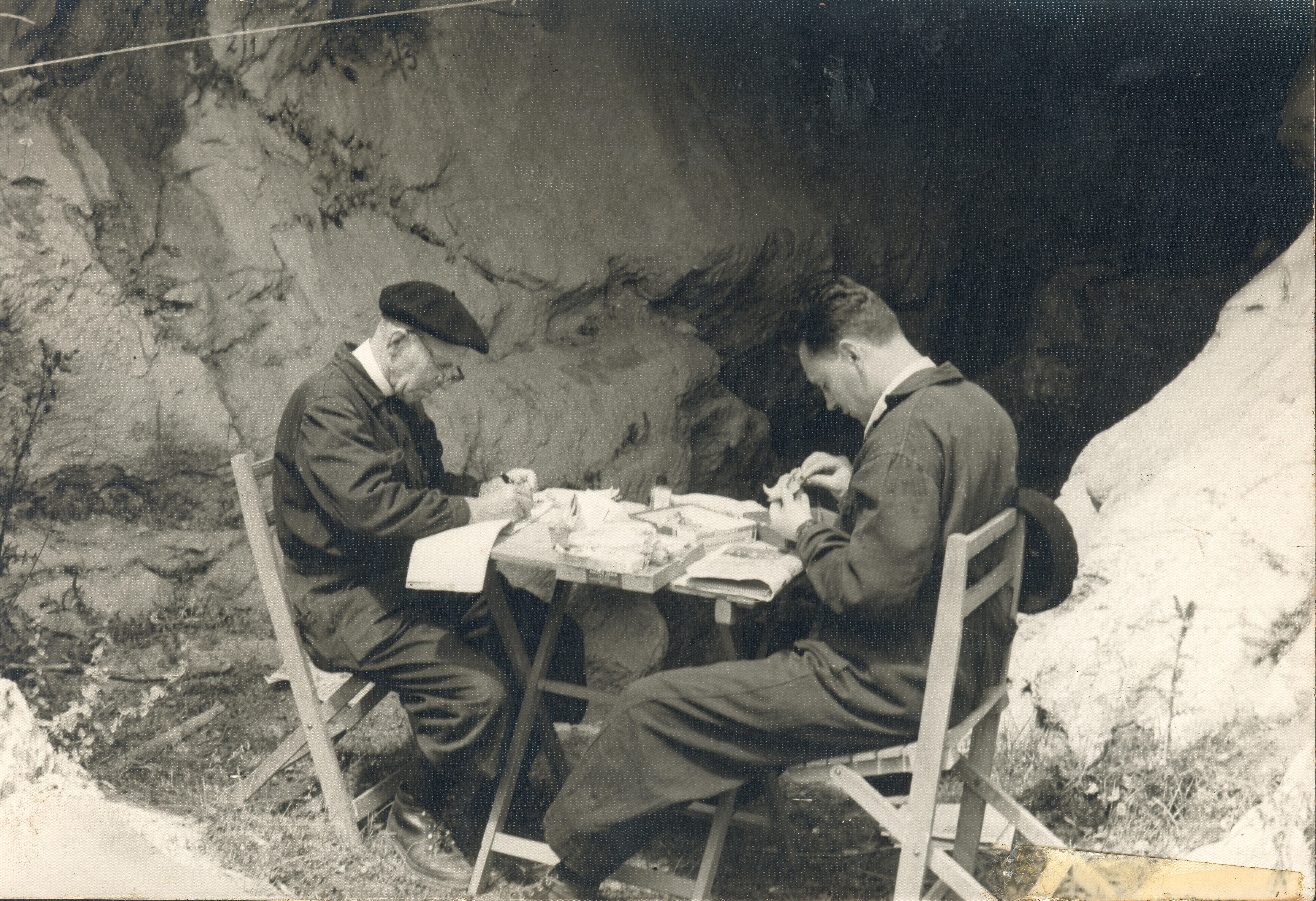 Barandiaran eta Altuna Lezetxikiko sarreran